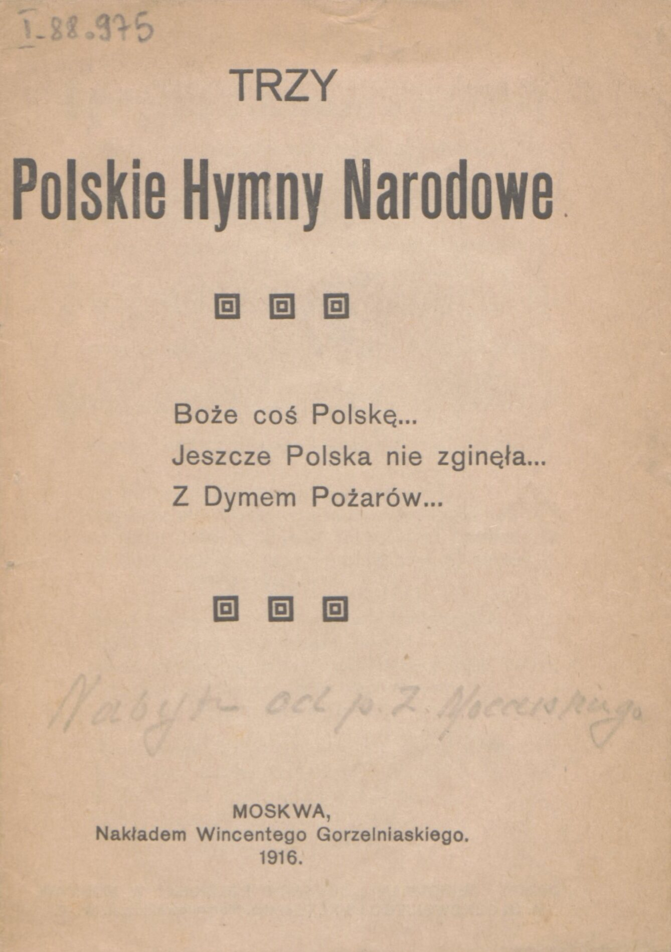 Trzy Polskie Hymny Narodowe: Boże coś Polskę, Jeszcze Polska nie zginęła, Z dymem pożarów